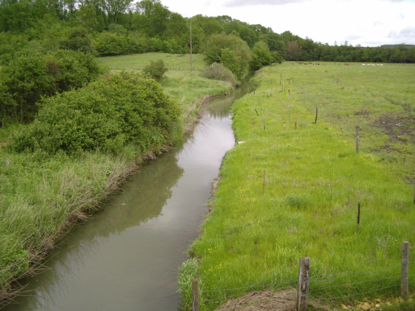 Marsal 57 France, Bras secondaire de la Seille à son croisement avec la D38a